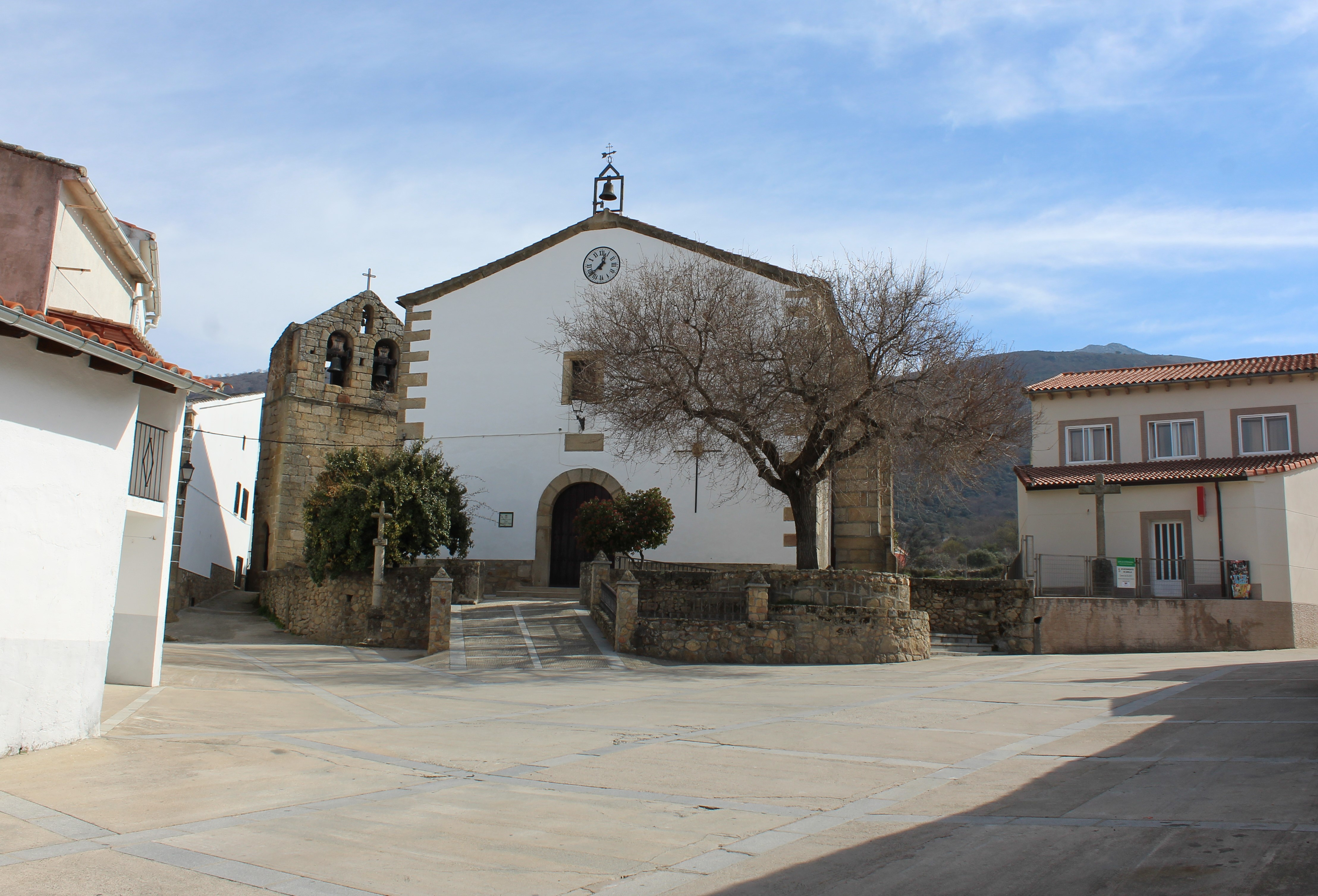 Jarilla-Iglesia parroquial